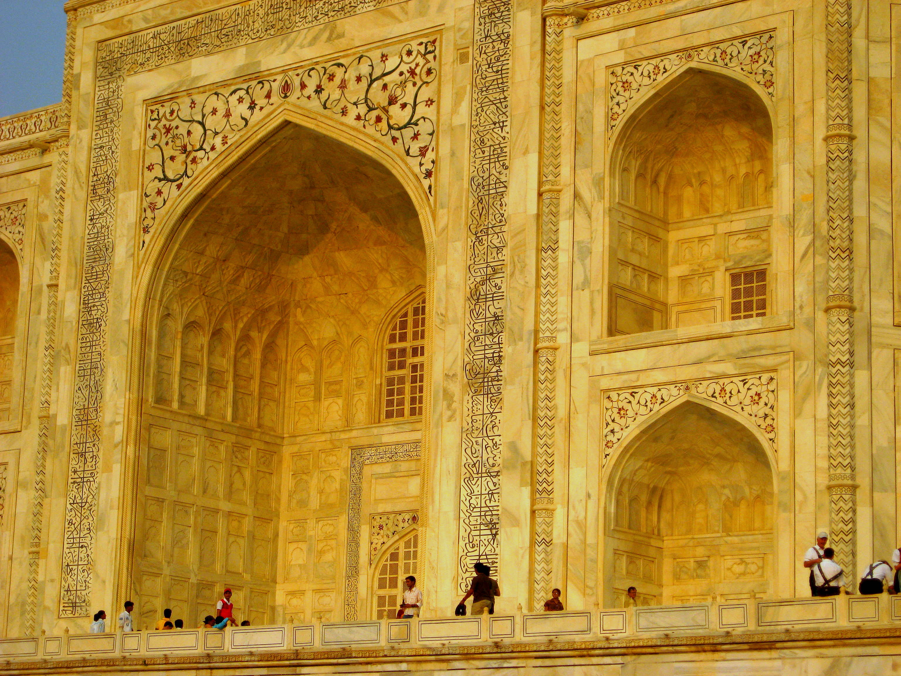 Taj Mahal